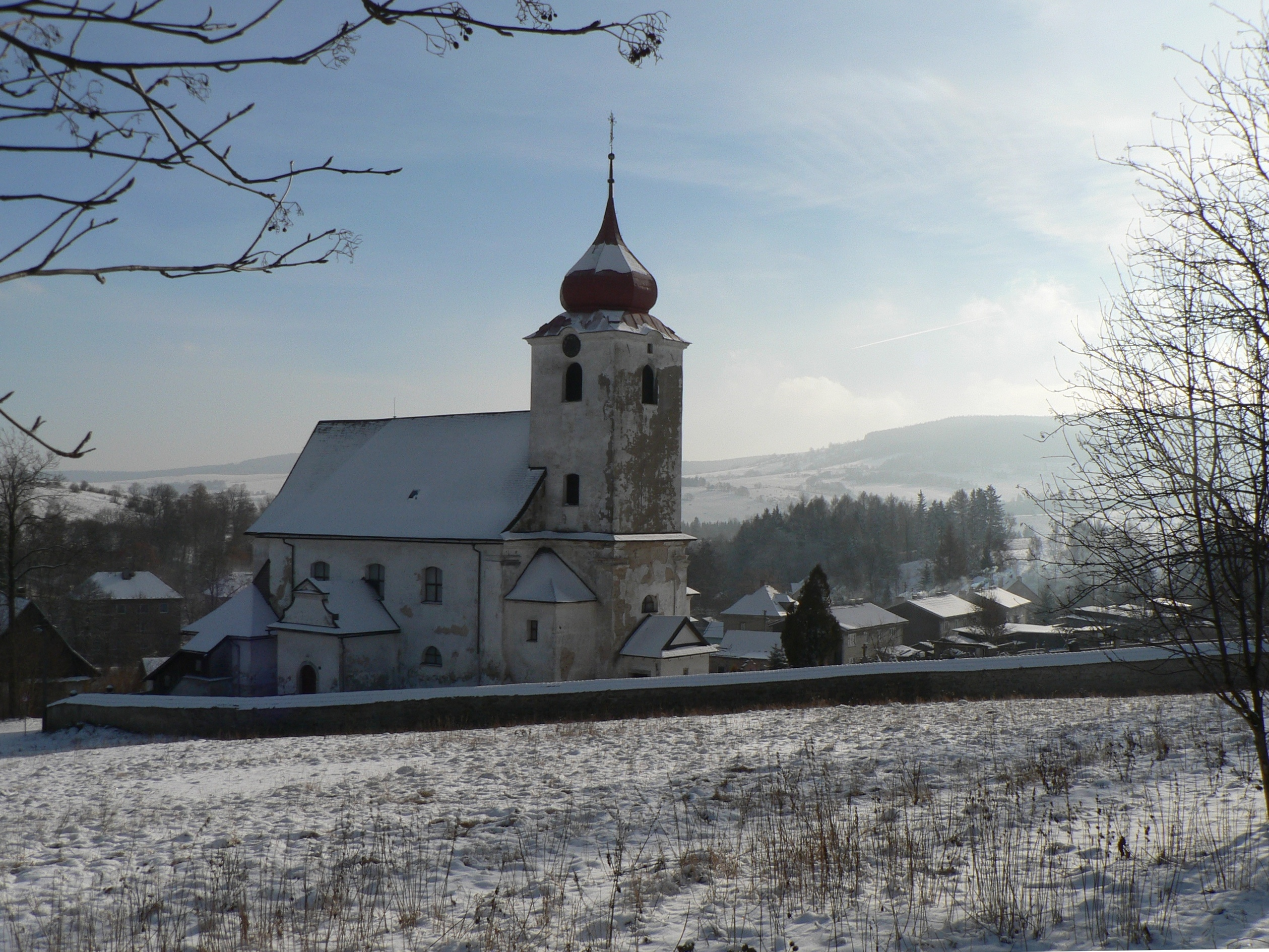 Pohled na obec s kostelem